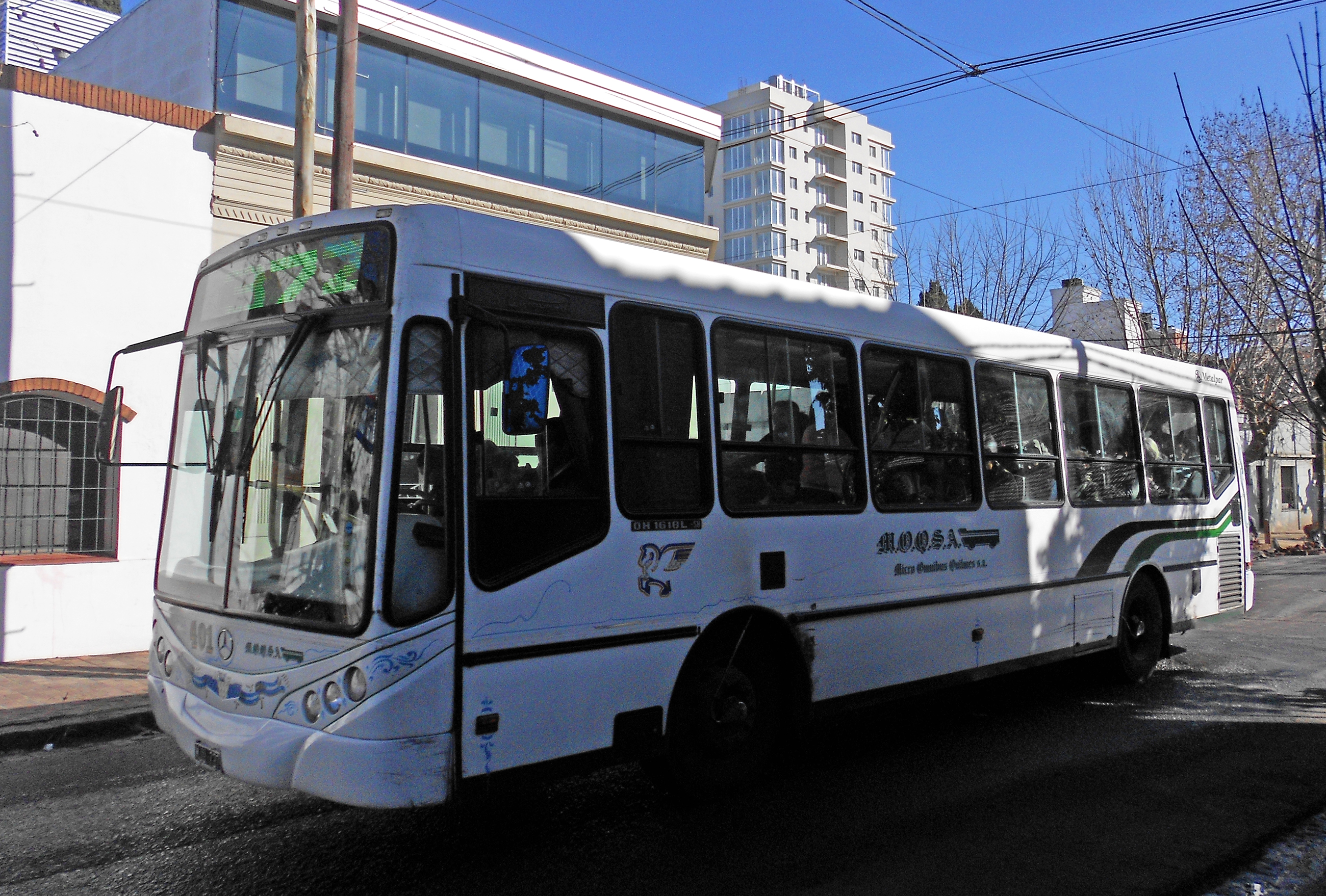 Interno de la línea 584 circulando por la calle Brown, en Quilmes.